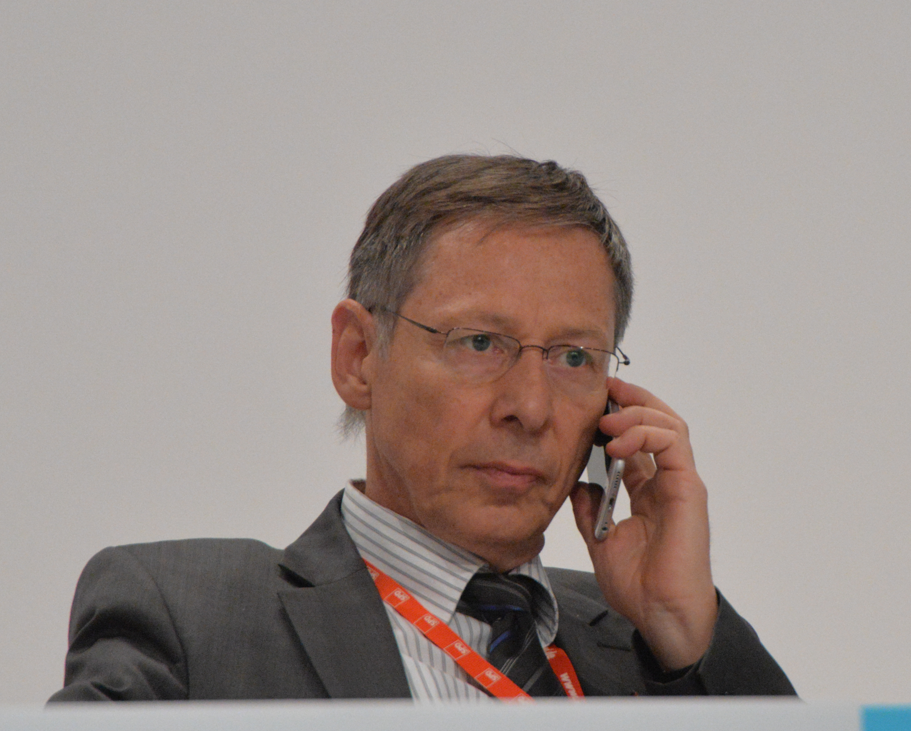 SPD Bundesparteitag Berlin, 10.-12. Dezember 2015, CityCube, Messe Berlin